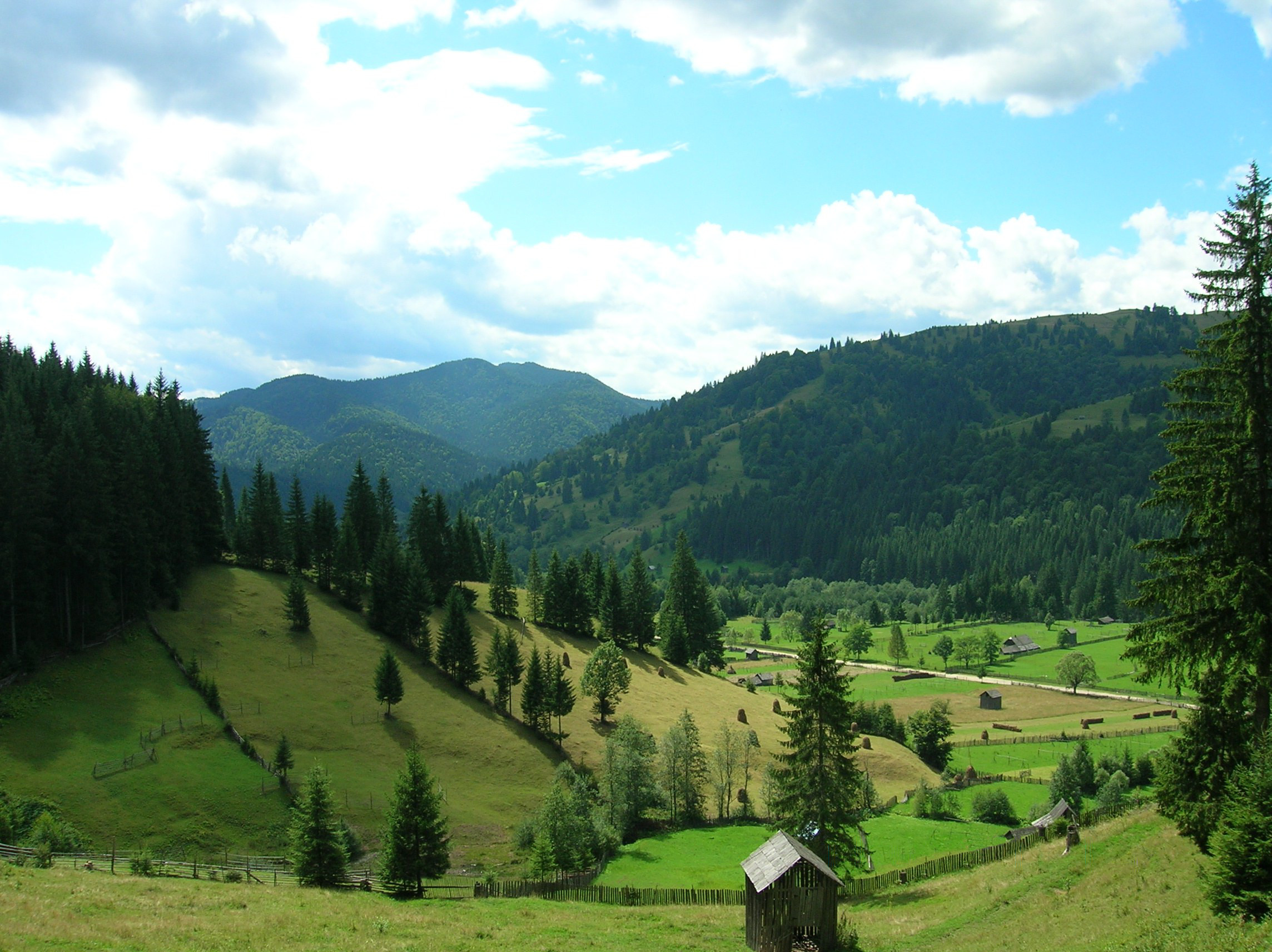 Privelişte spre Valea Sabasei de pe primele serpentine ale "Drumului Talienilor" Borca - Mălini